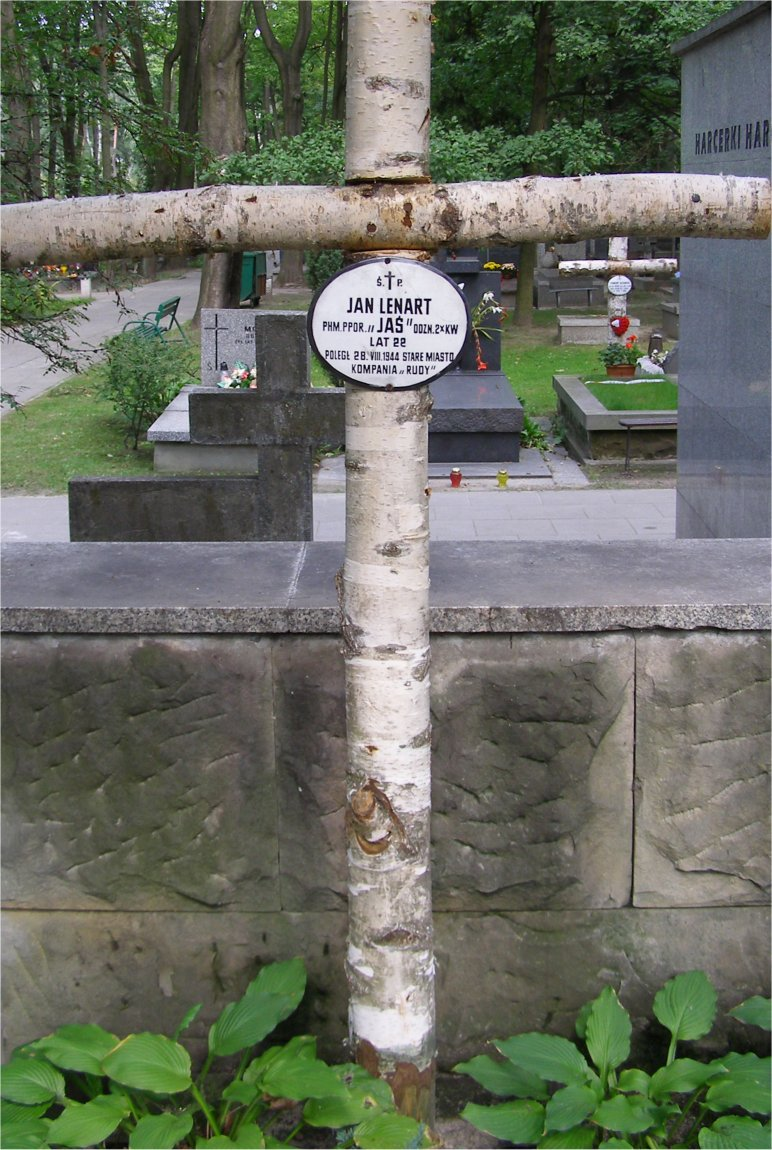 Jan Lenart